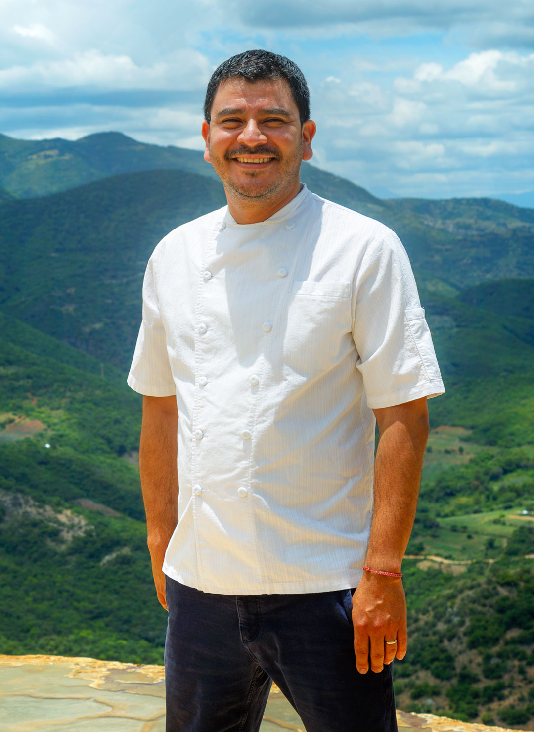 Retrato del chef Rodolfo Castellanos en Hierve el Agua